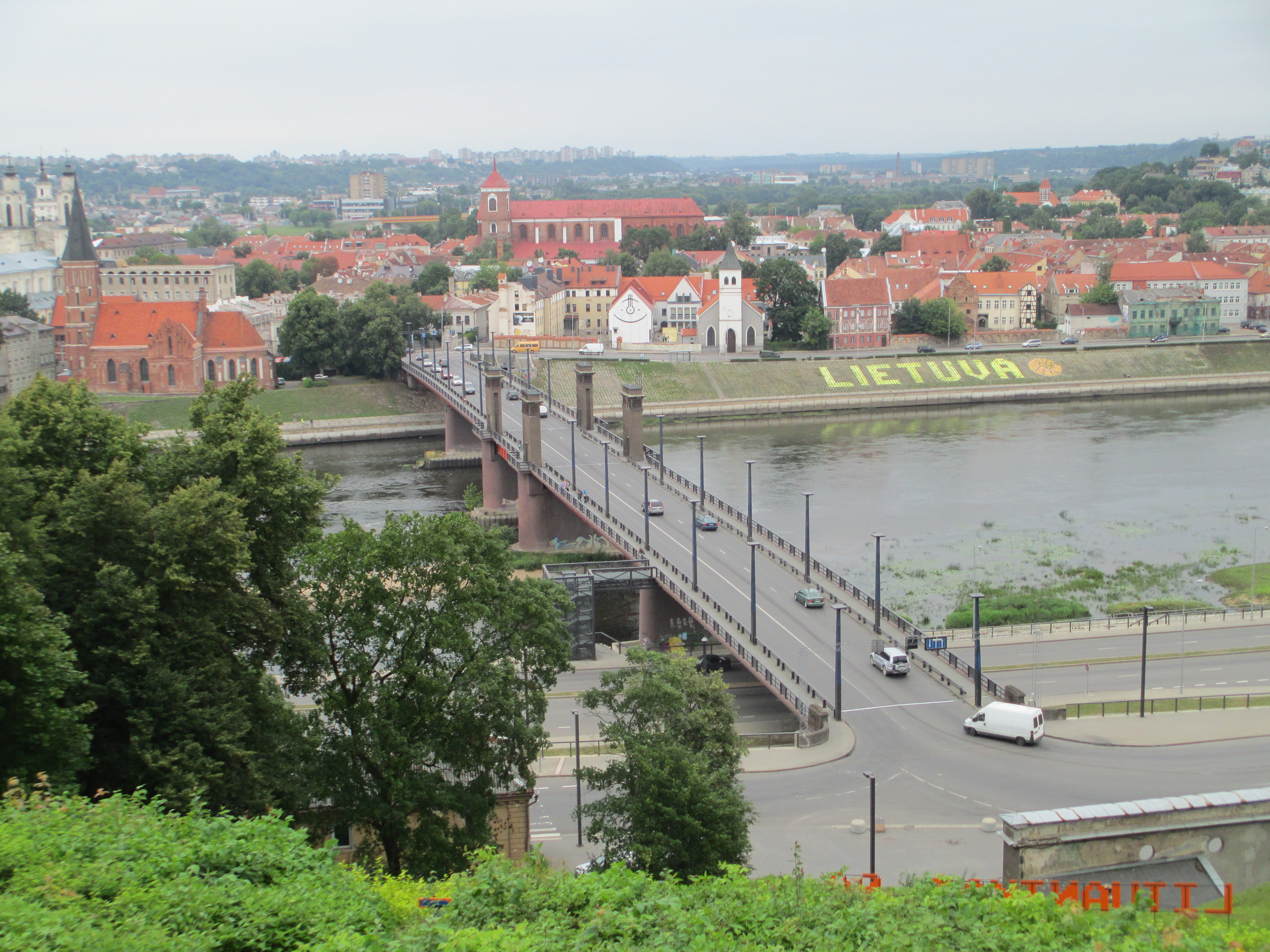 מבט על קובנה מגבעת אלקסוטס